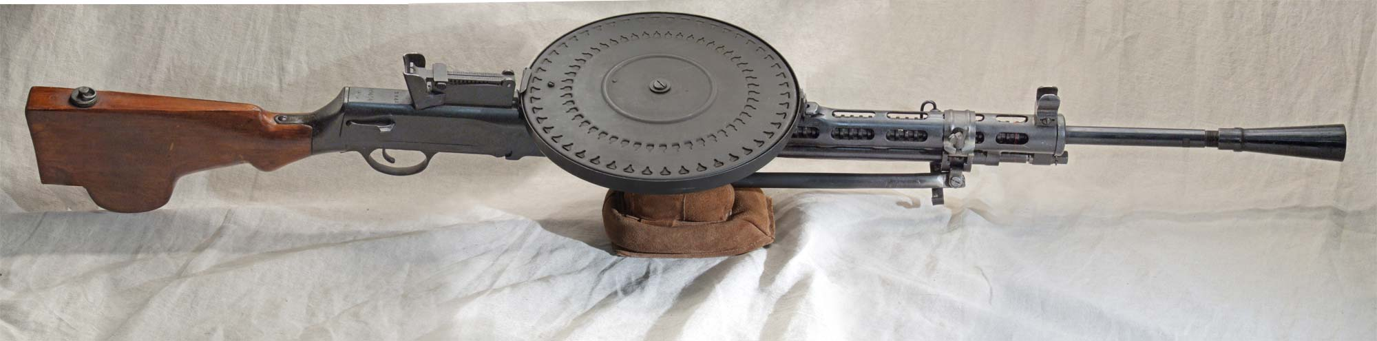 fusil mitrailleur soviétique DEGTYAREV DP 28